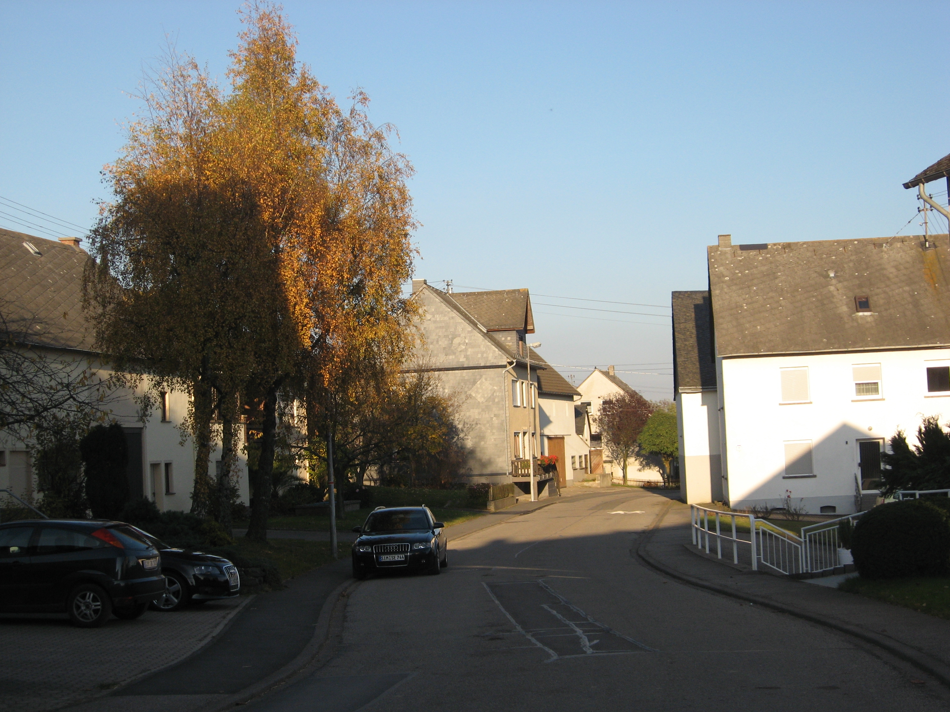 Hungenroth. Bildmitte: Rhein-Mosel-Straße 9.